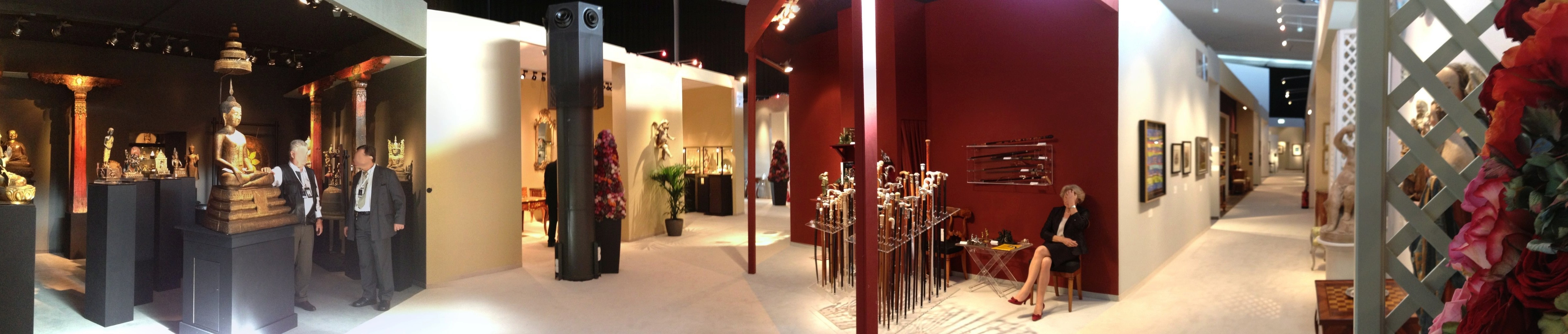 Kunstmesse München 58 (2013), Panoramic View, im "Postpalast" München